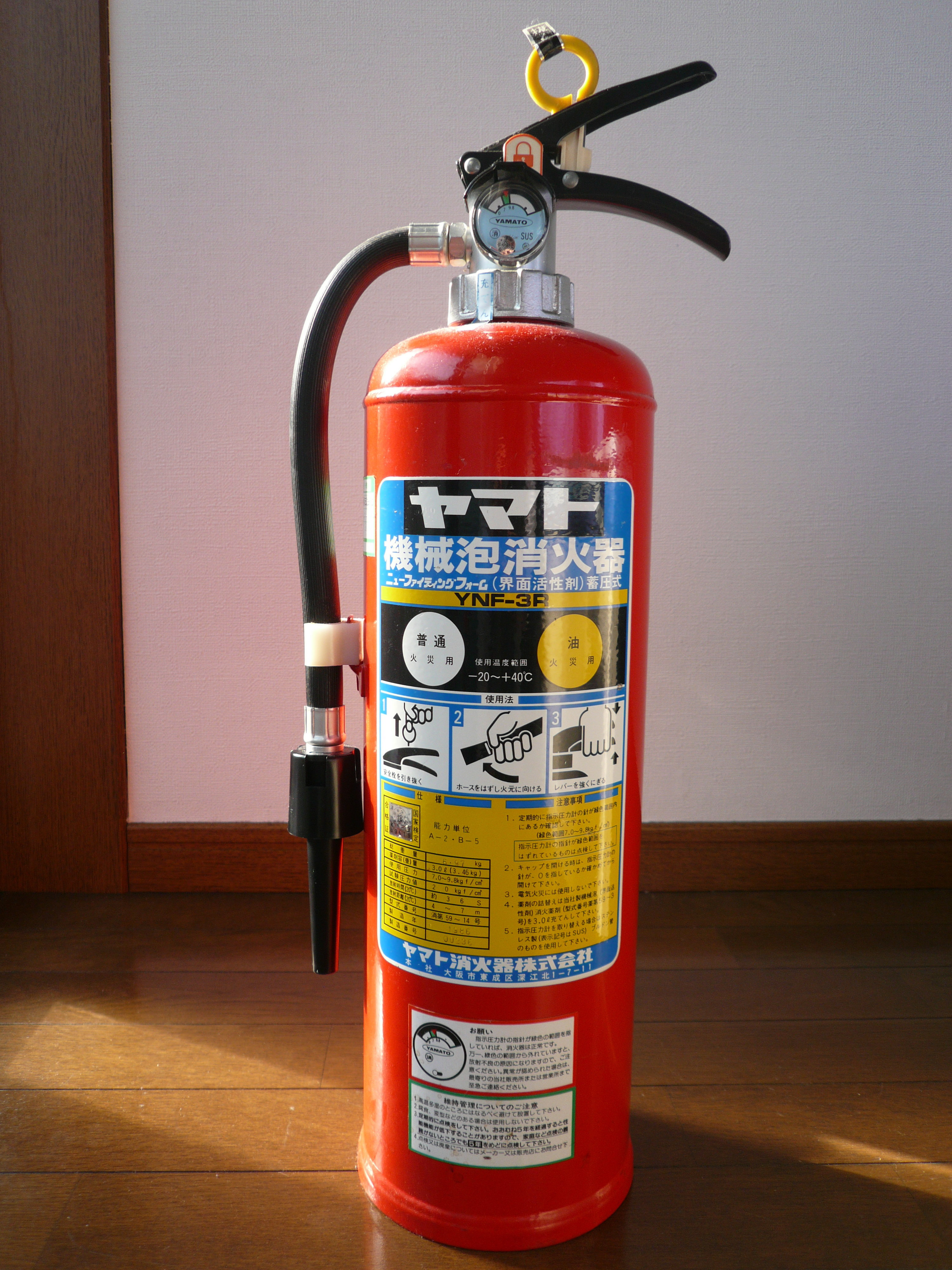 вогнегасник